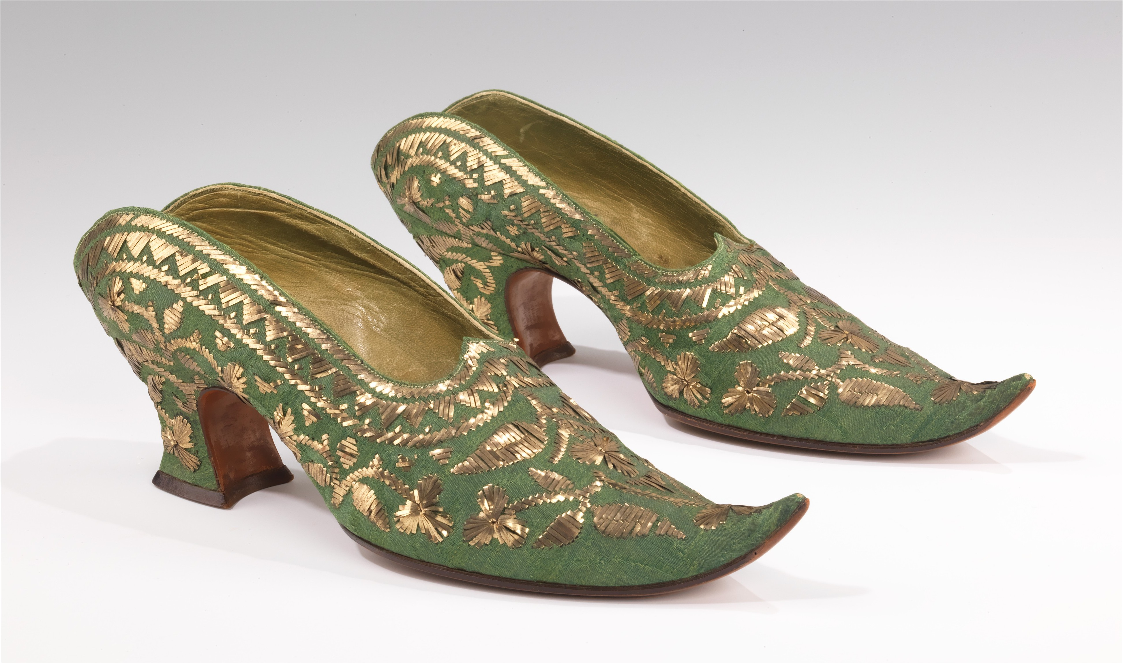 French; Mules